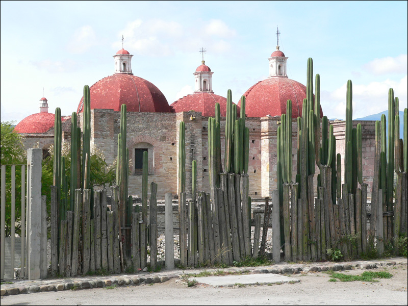 Description : Grupo de Iglesia - Mitla - Oaxaca - México Author : kornemuz Date : septembre 2006